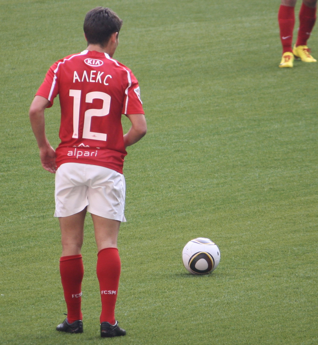 Alex Raphael Meschini